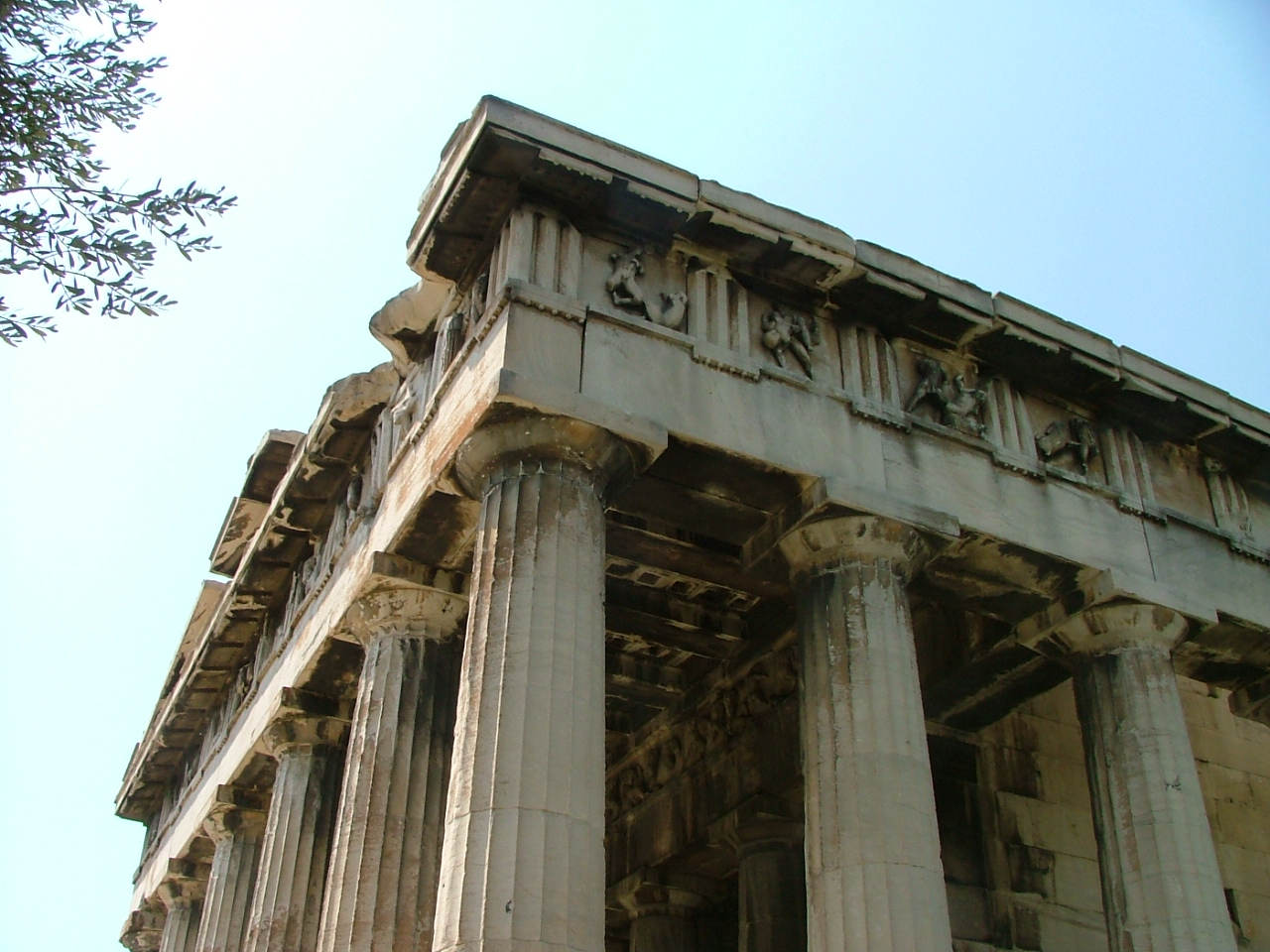 Templo de Hefesto en el Ágora de Atenas.